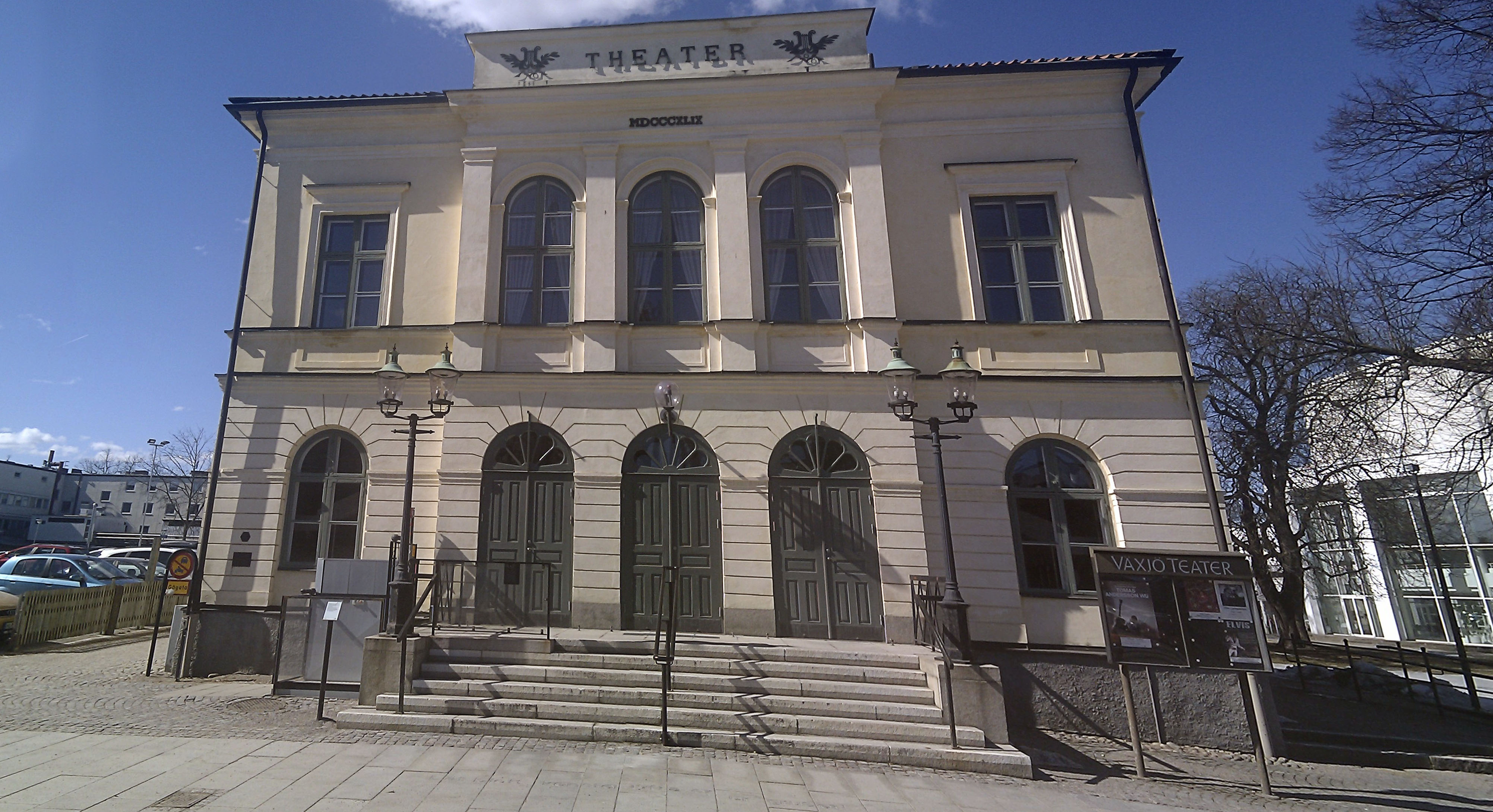 Växjö gamla teater sedd framifrån